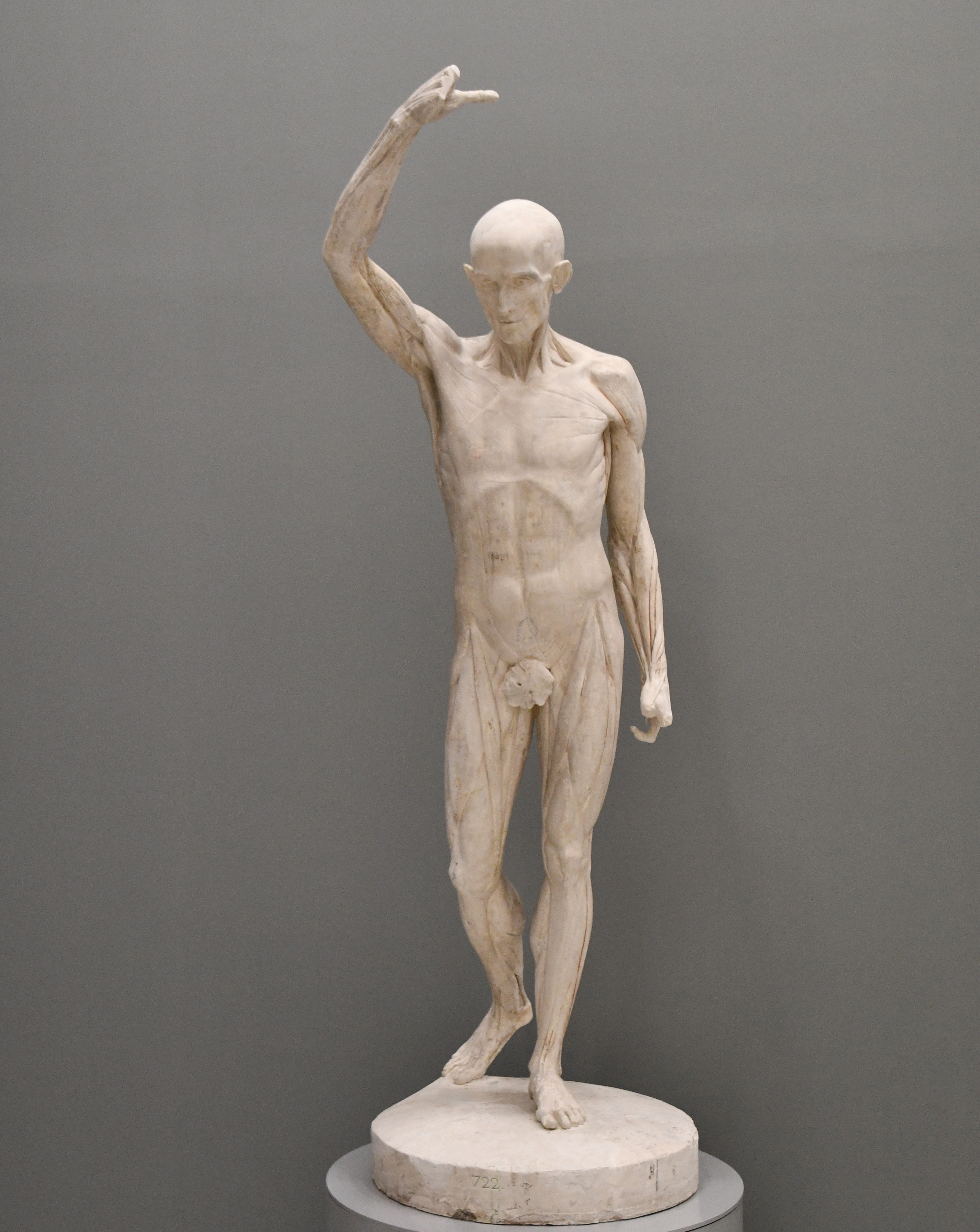 Houdon Jean Antoine, L'écorché bras levé, Musée Fabre, Montpellier